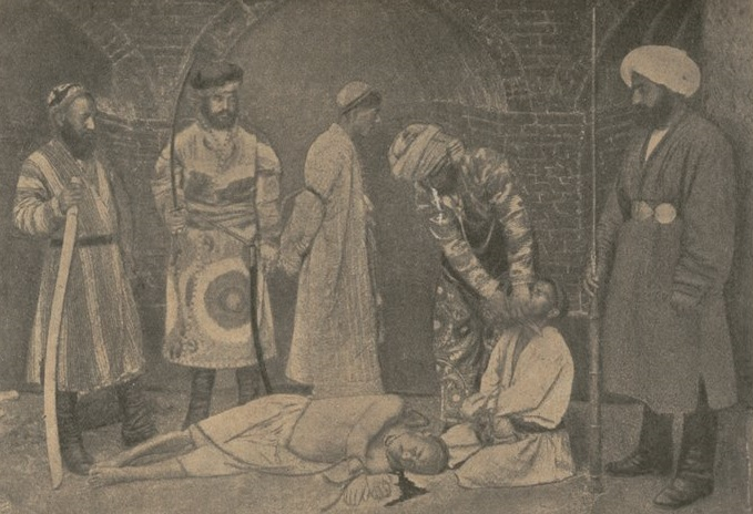 Смертная казнь в Бухаре